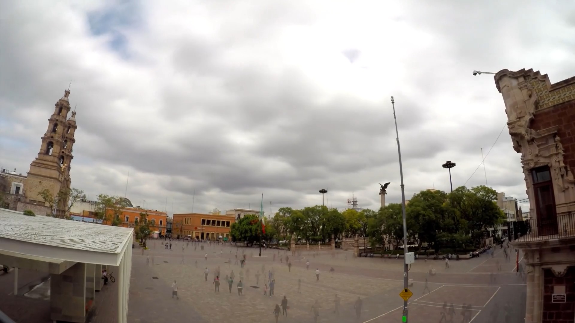 Plaza de la Patria centro histórico de Aguascalientes, México